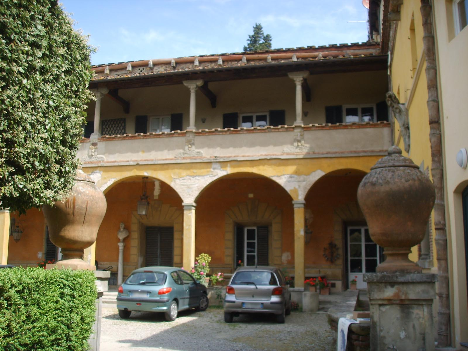 Villa nieunwekamp